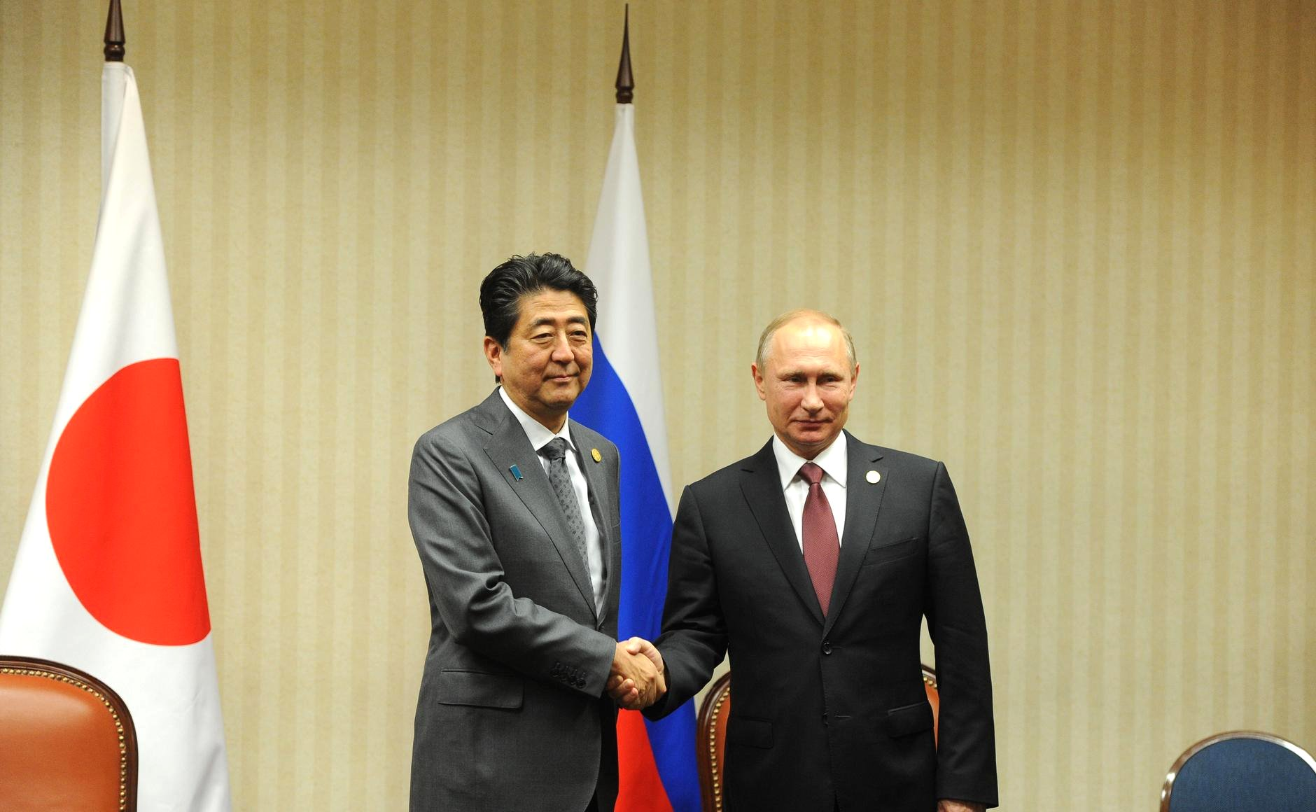 Встреча Президента России Владимира Путина с Премьер-министром Японии Синдзо Абэ